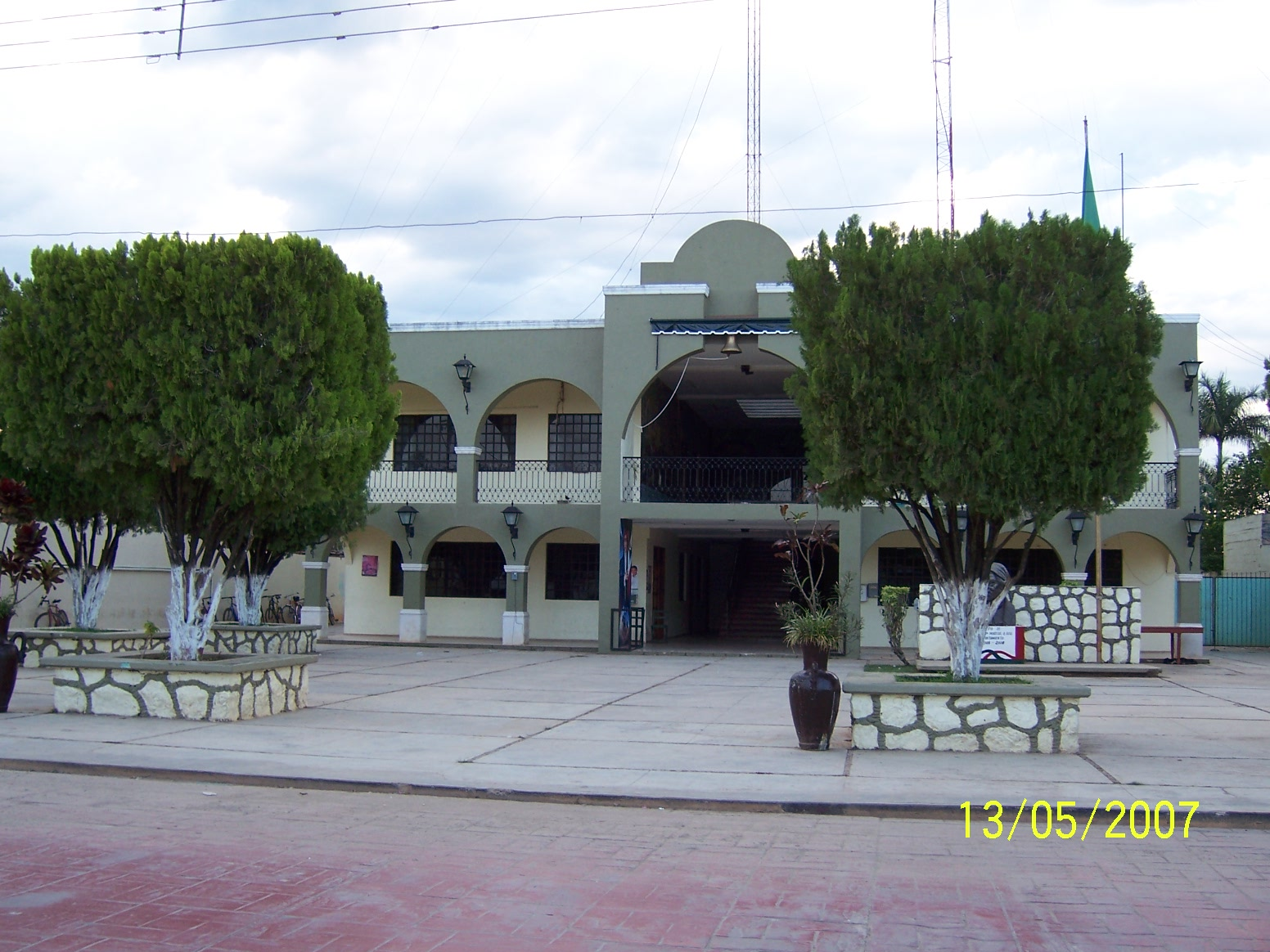 PALACIO MUNICIPAL JOSE MARIA MORELOS Q.ROO